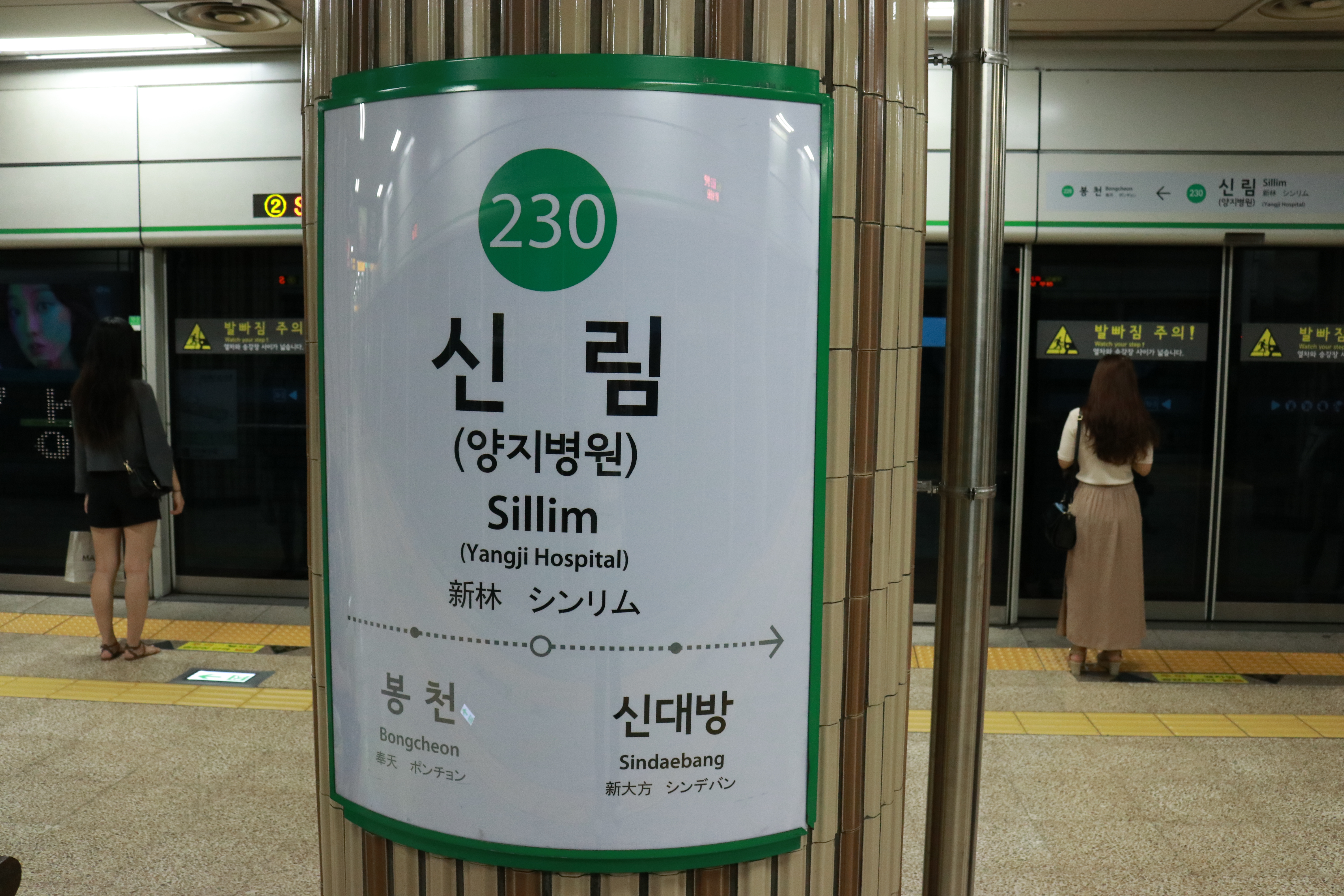 신림역 역명판